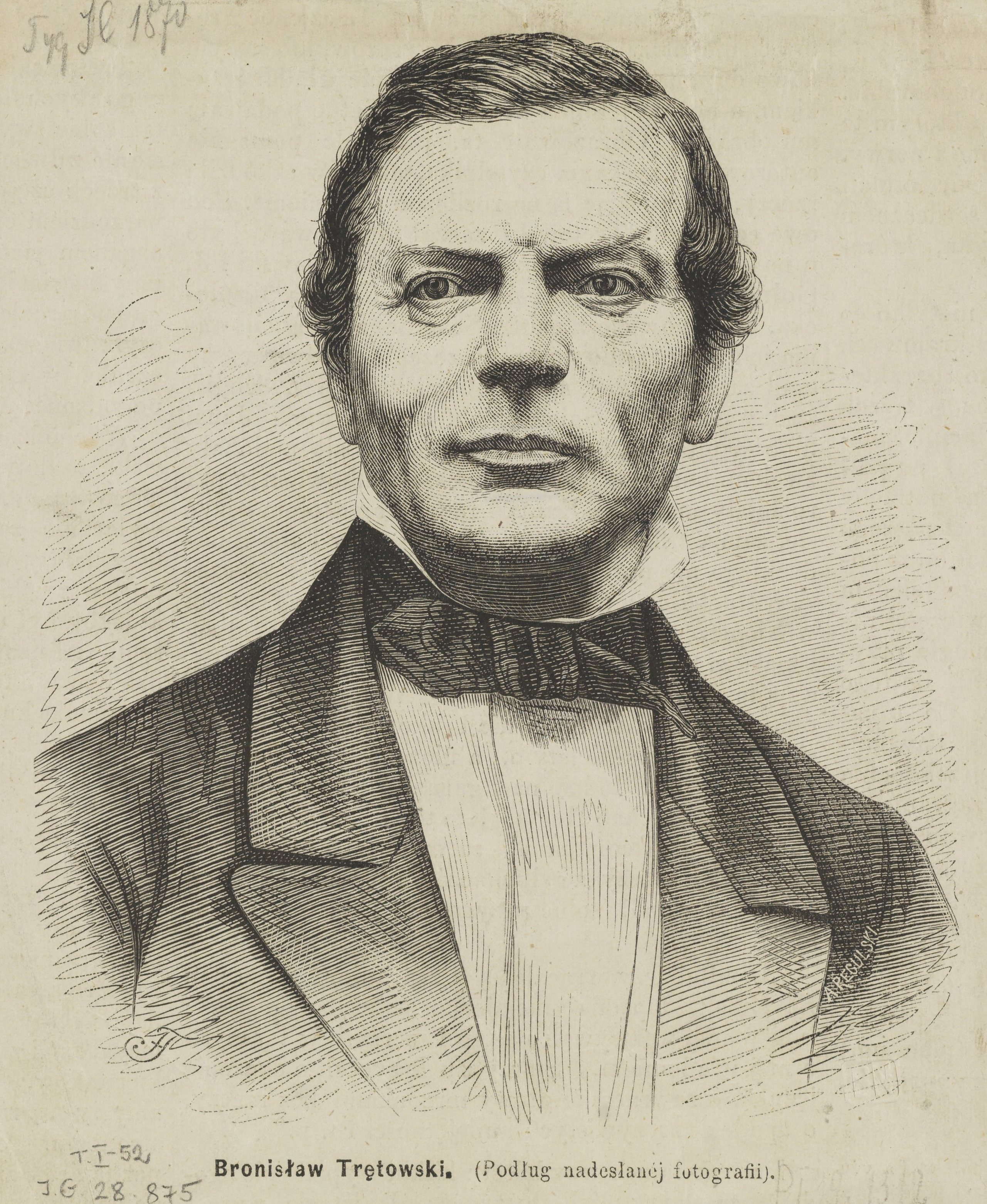 Drzeworyt przedstawiający Bronisława Trentowskiego.